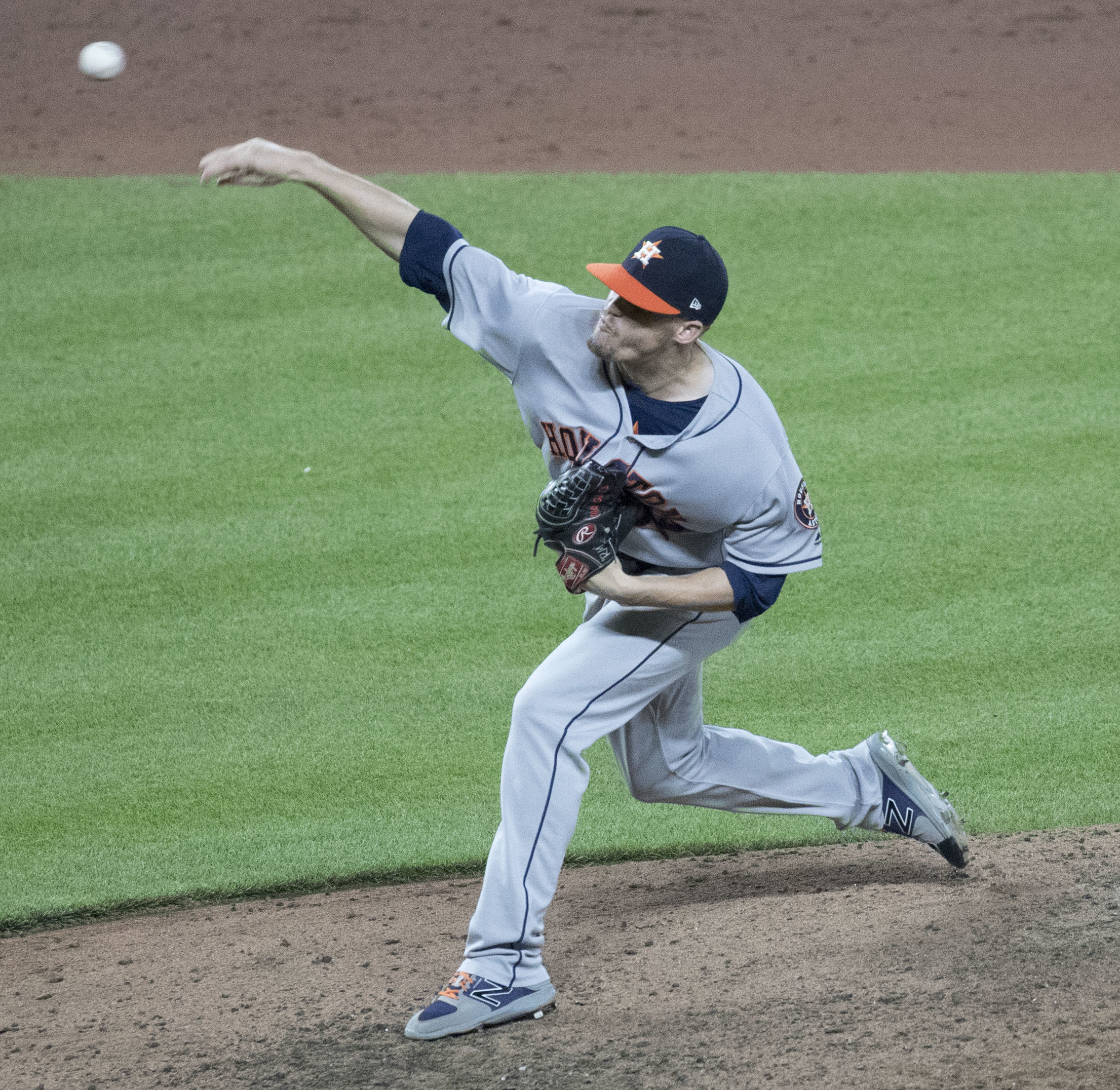 Astros at Orioles 7/21/17